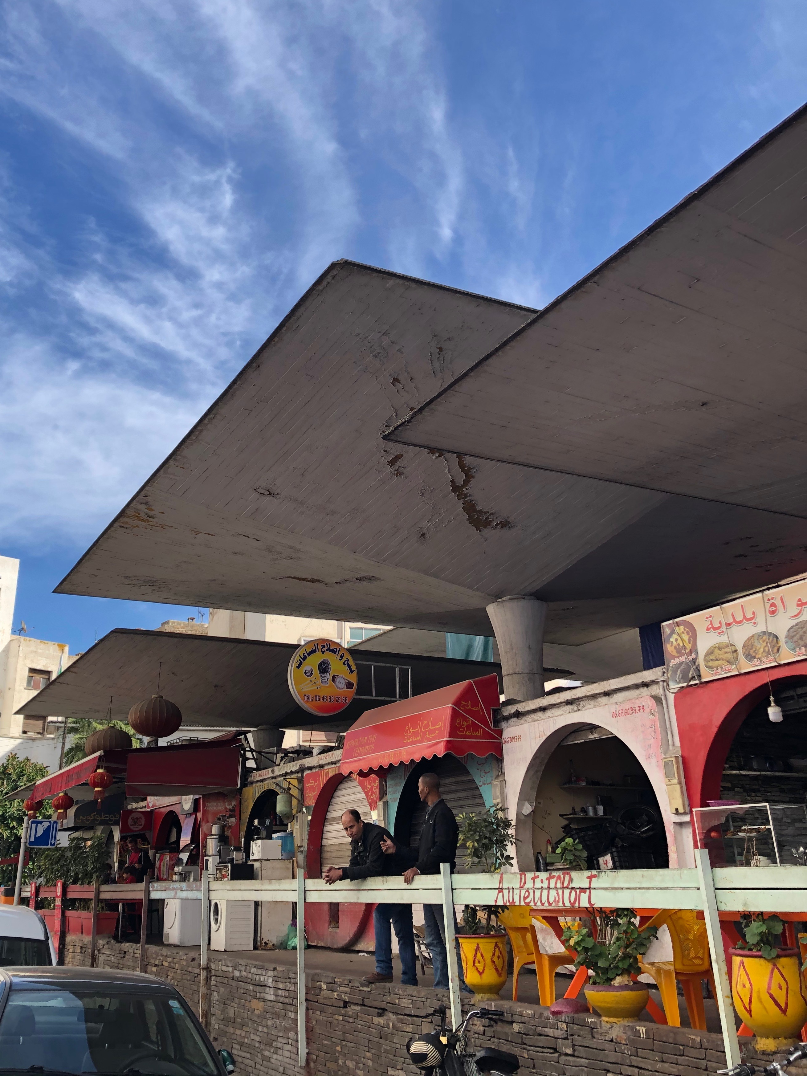 سوق شارع أكادير في الدار البيضاء جون فرنسوا زيفاكو 1973-1974